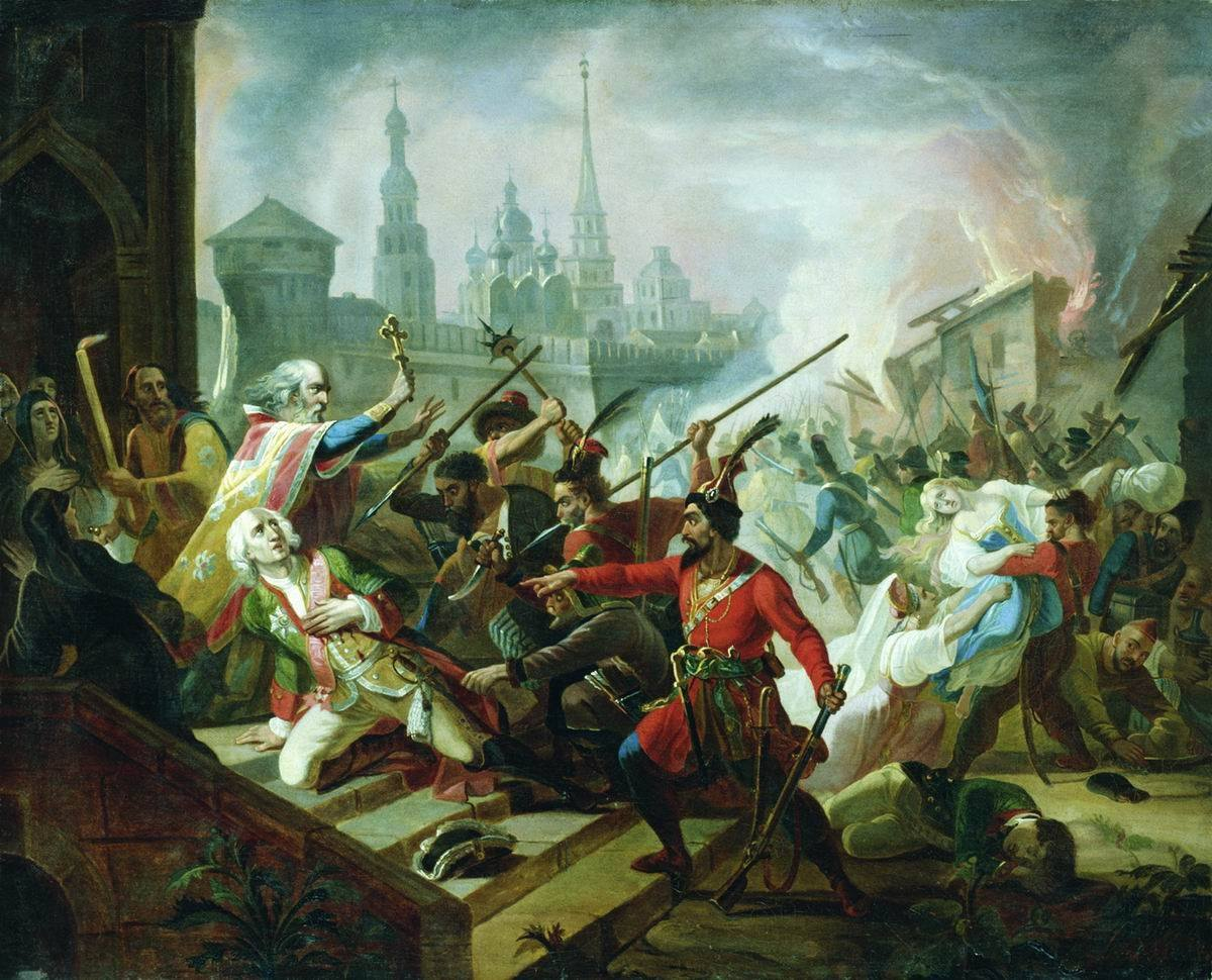 Штурм Пугачевым Казани